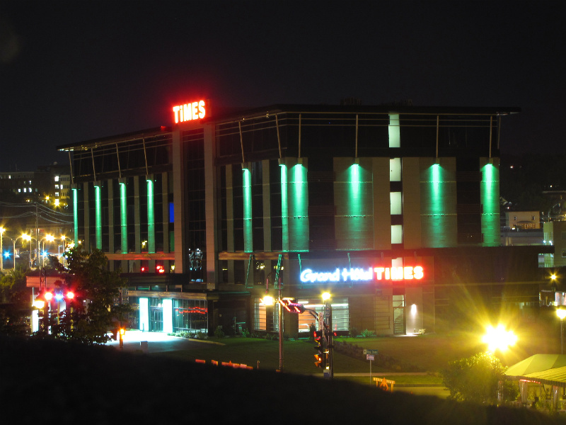 L'hotel times au centre-ville de Sherbrooke près du lac des nations.